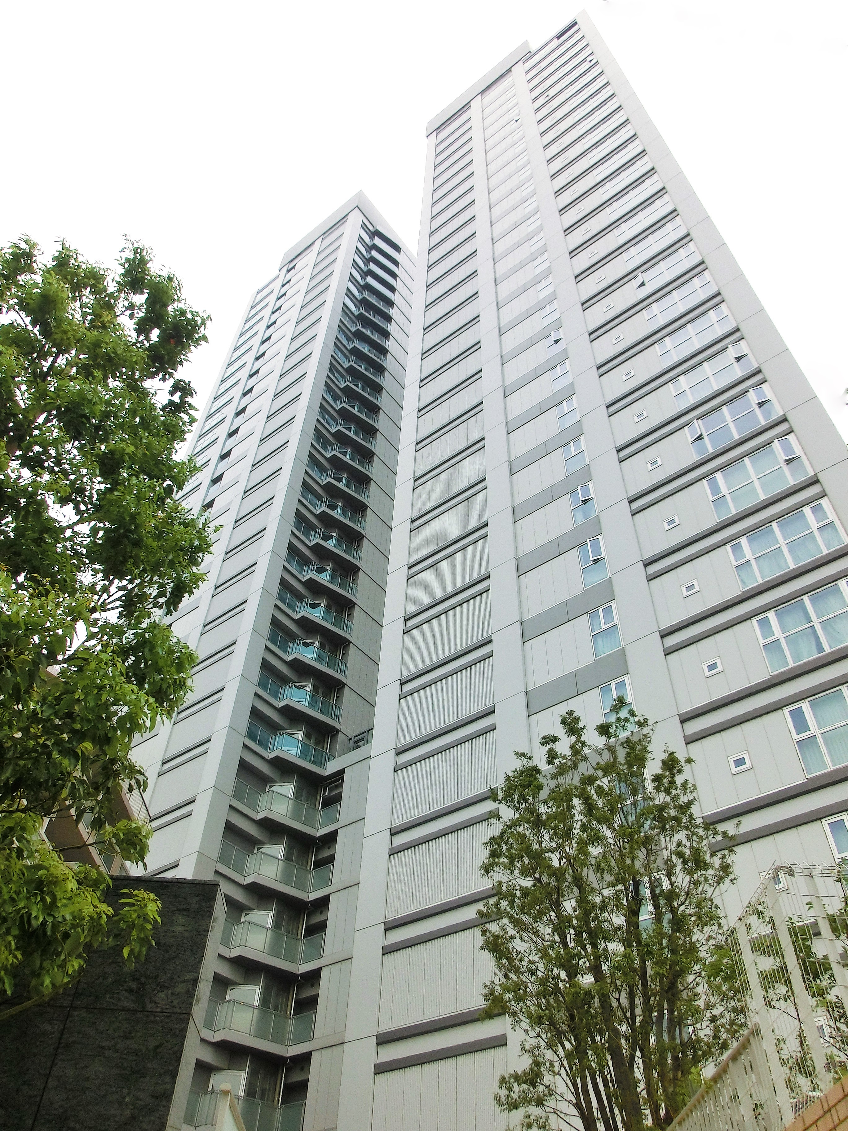 桃園通り（中野ツインマークタワーが面している二つの道路のうち、中野通でないほう）から撮影した中野ツインマークタワー